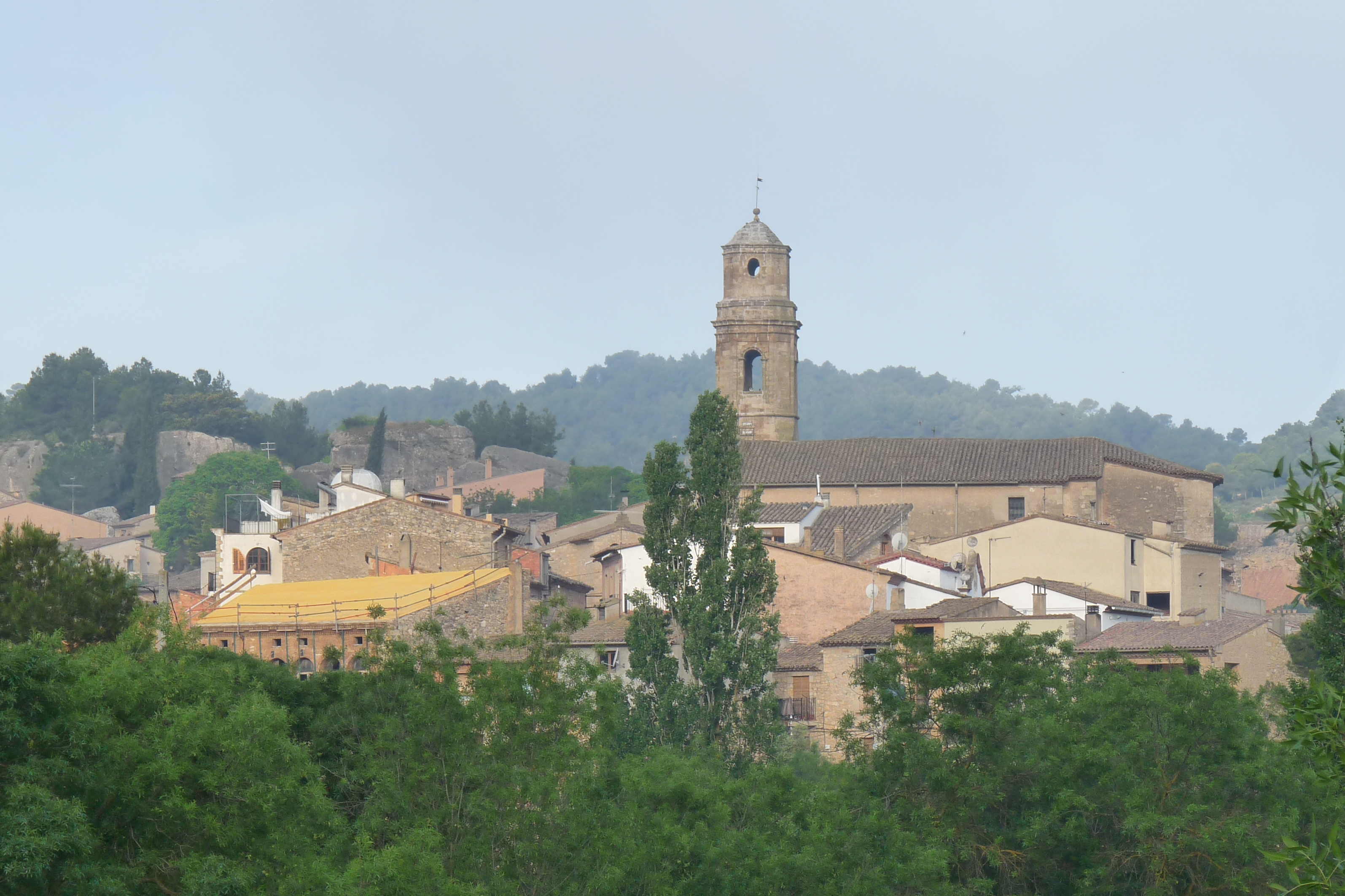 Vallclara